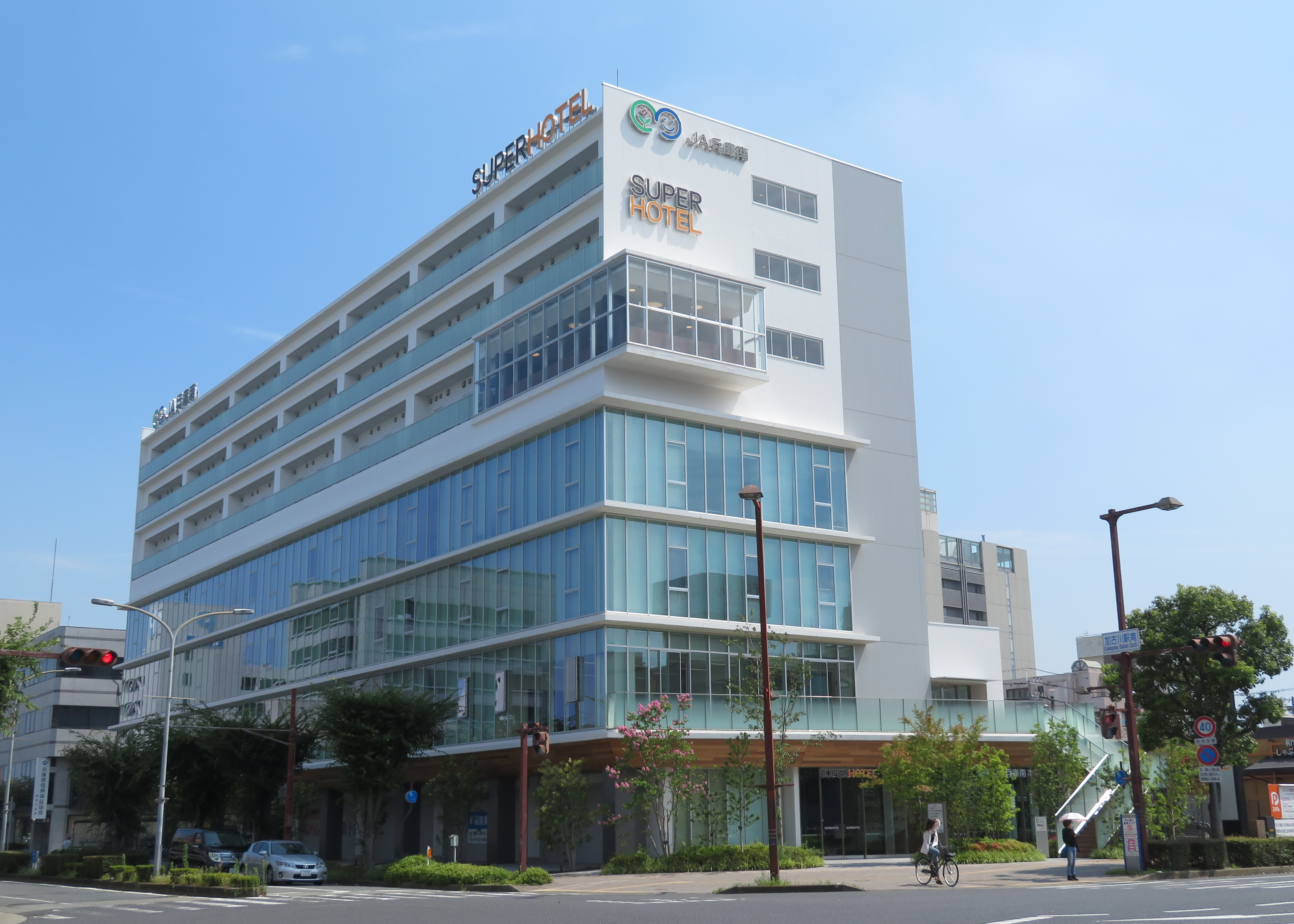 兵庫南農業協同組合本店